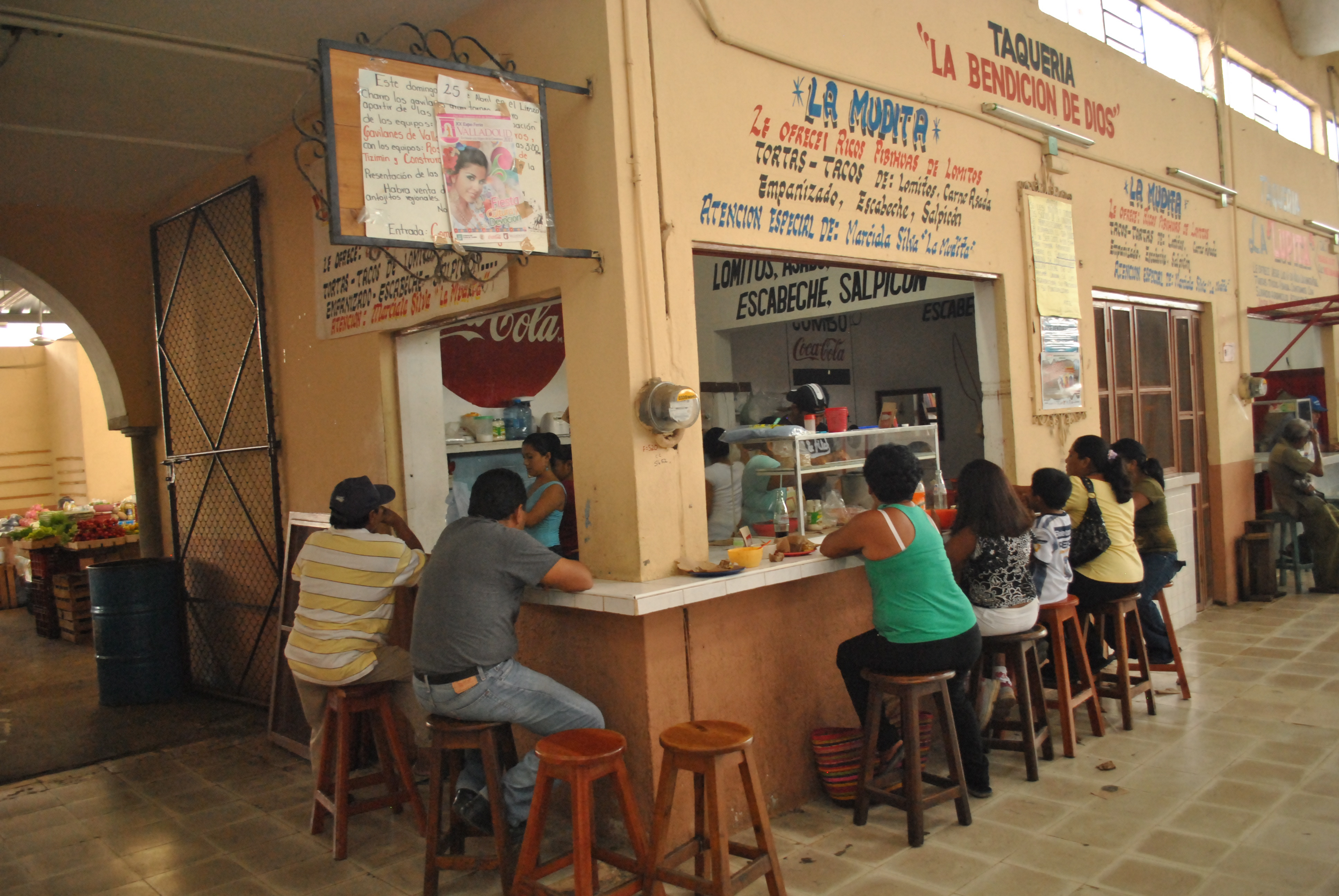 La Mudita, Valladolid, Yucatán, Mx.